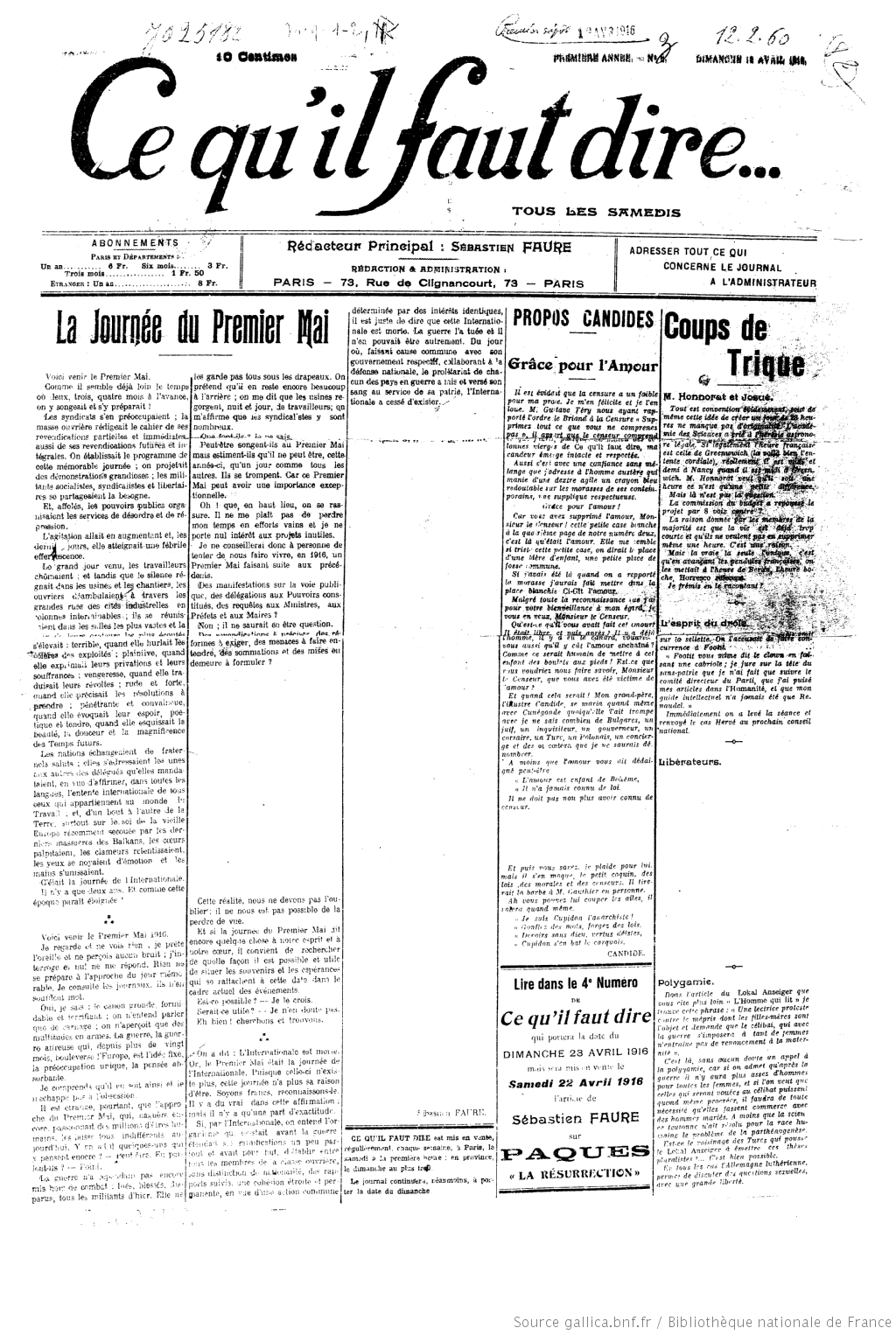 Ce qu'il faut dire est un journal anarchiste fondé le 2 avril 1916 par Sébastien Faure et d'autres anarchistes pour s'élever contre la guerre et le « Manifeste des Seize ». Censuré, pas une ligne du contre-manifeste présent dans le premier numéro ne pourra être publiée. - n°3, 18 avril 1916.